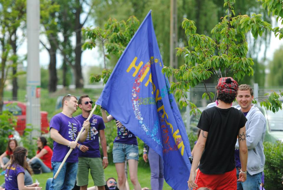 17. Marosvásárhelyi Diáknapok és Diákfesztivál, 2014